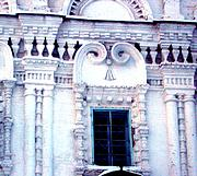 Декор церкви во имя иконы Божией матери "Знамение" (с. Пасегово)